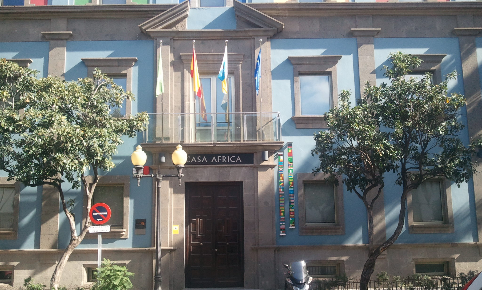 Fachada principal de la Casa África.